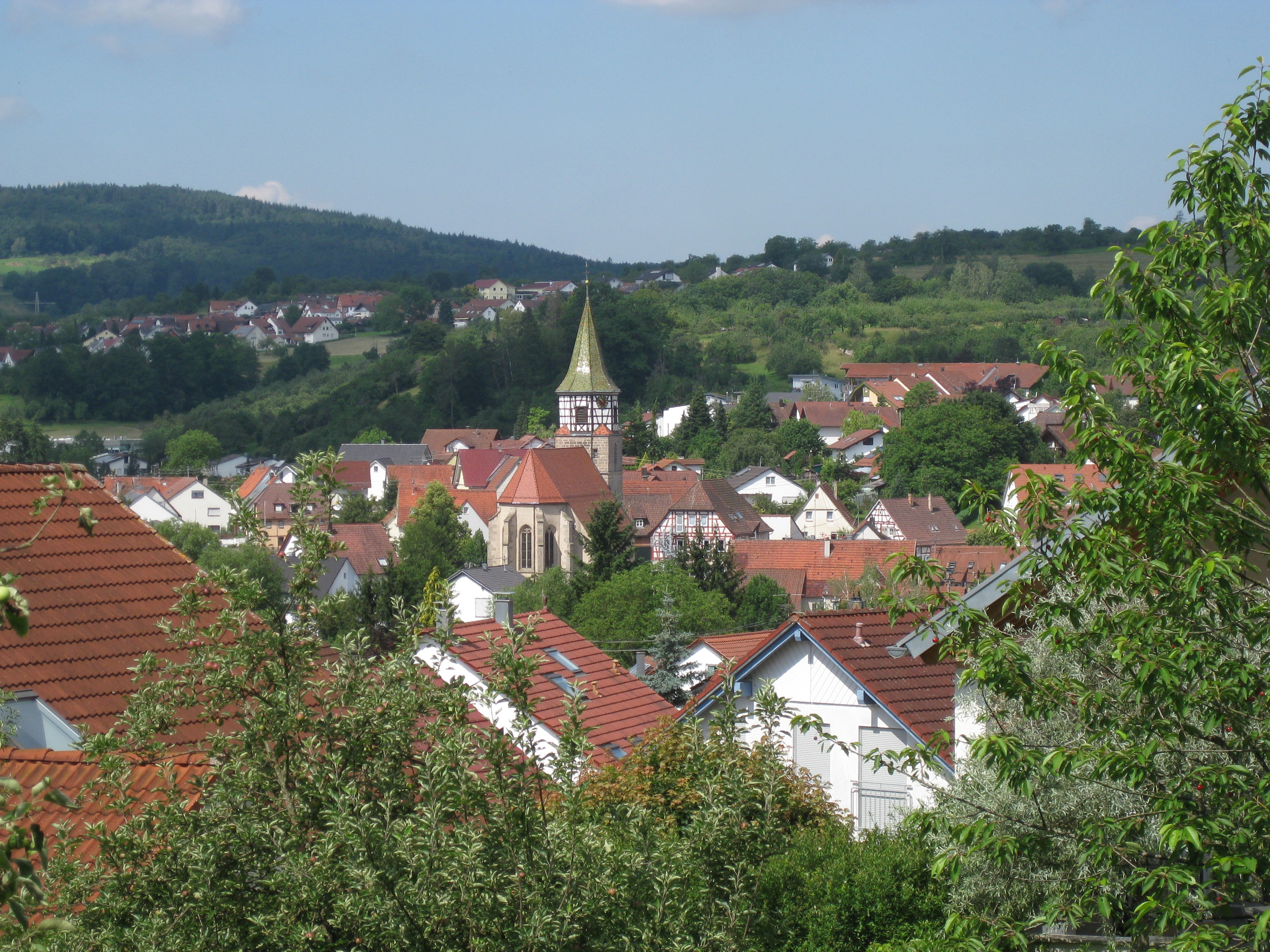 Blick aus Süden vom Distlerweg auf Berglen-Oppelsbohm